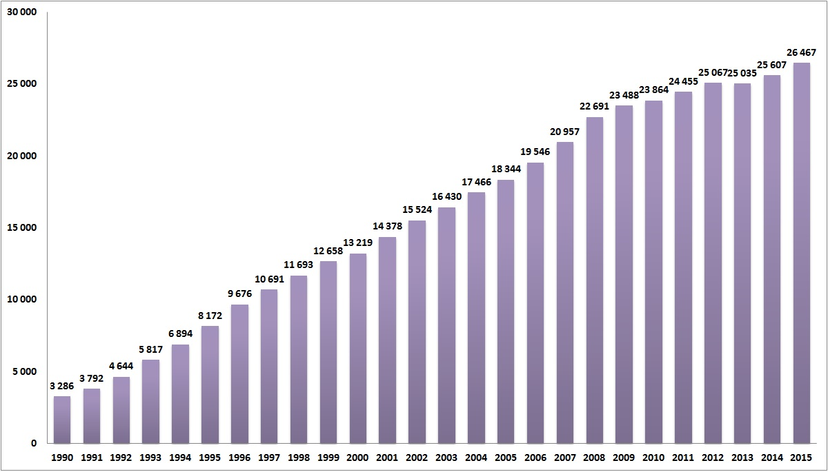 Měsíční průměrná mzda v ČR (1990-2015)